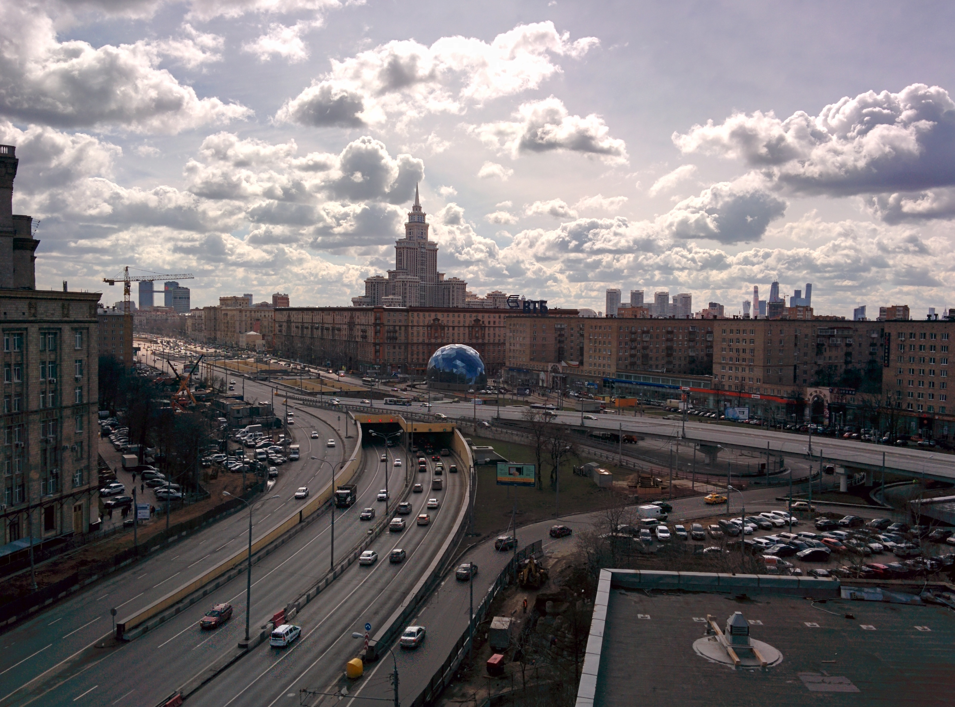 Ленинградское шоссе, Волоколамское шоссе, Гидропроект